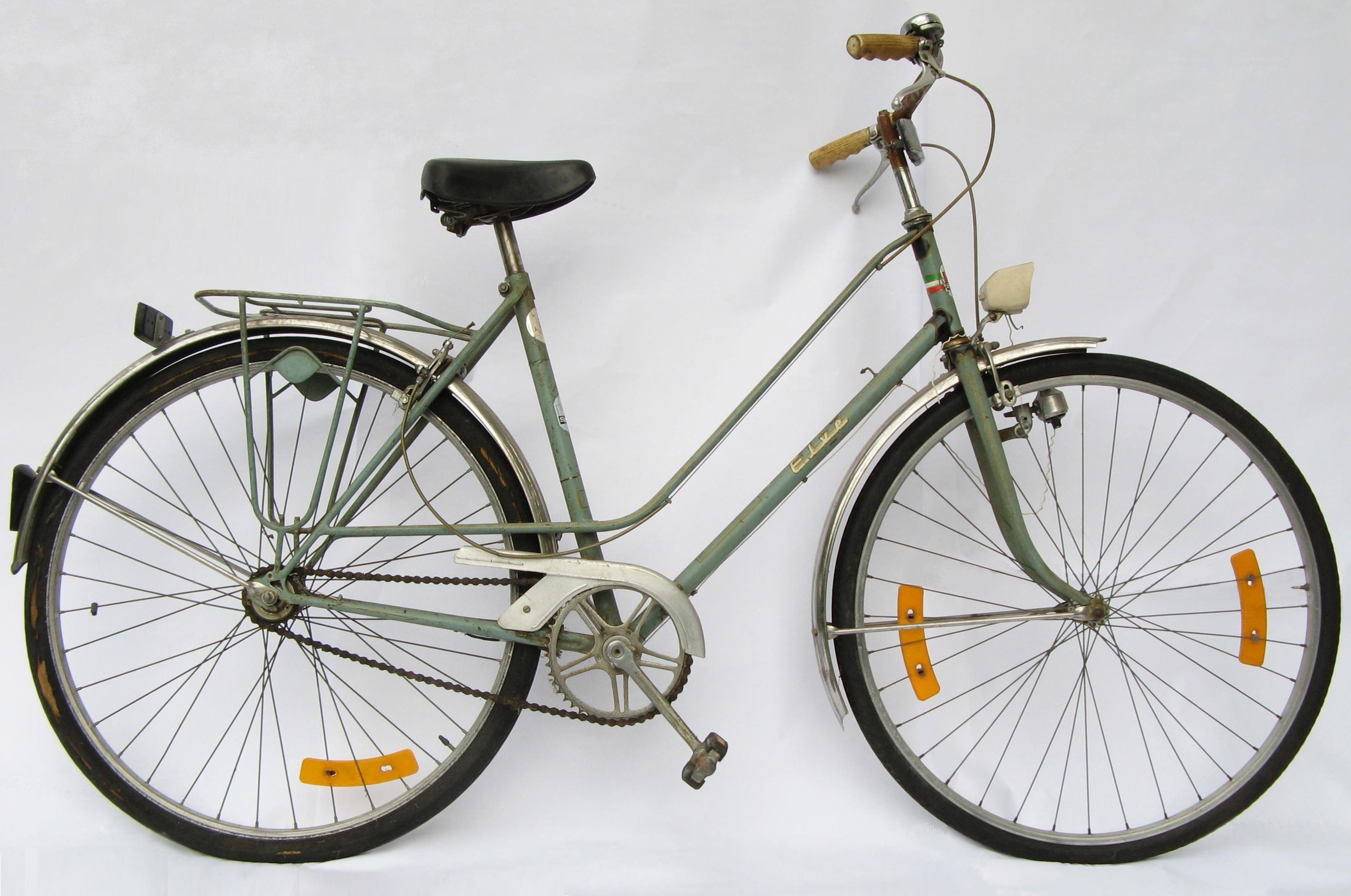 Een tourfiets van Elvé